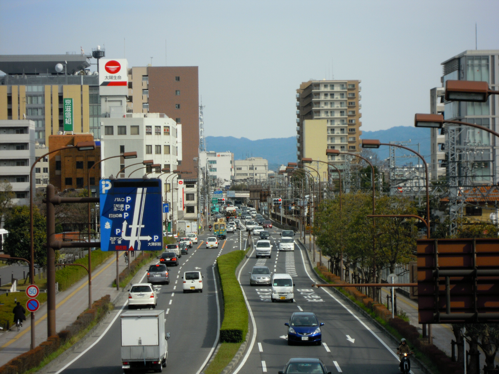 Hamamachi